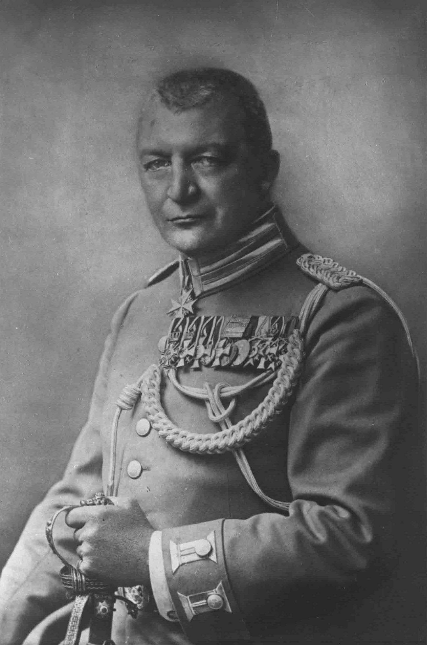 Victor Franke, Portrait 9x12